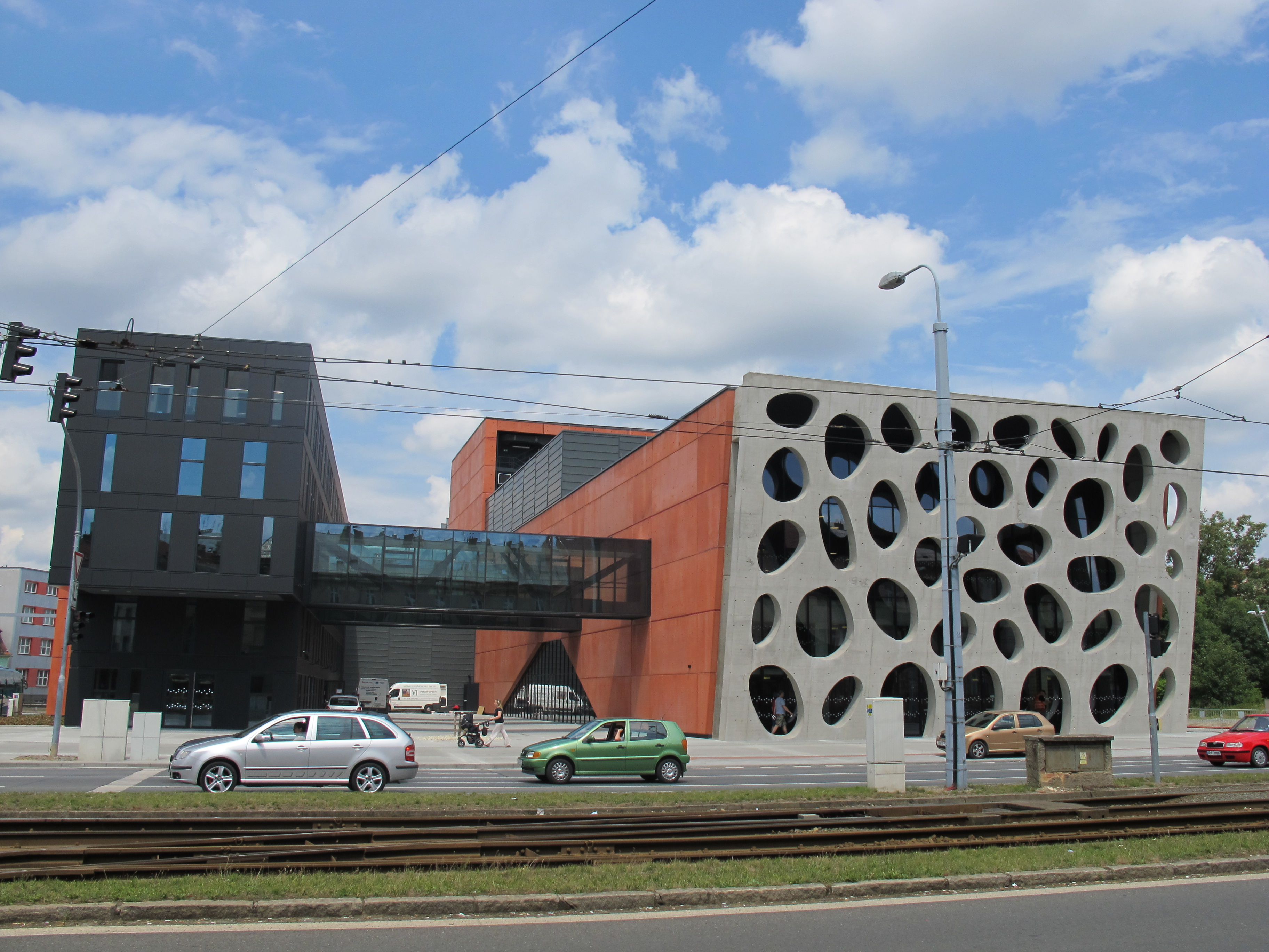 Nové divadlo v Plzni - téměř dokončené